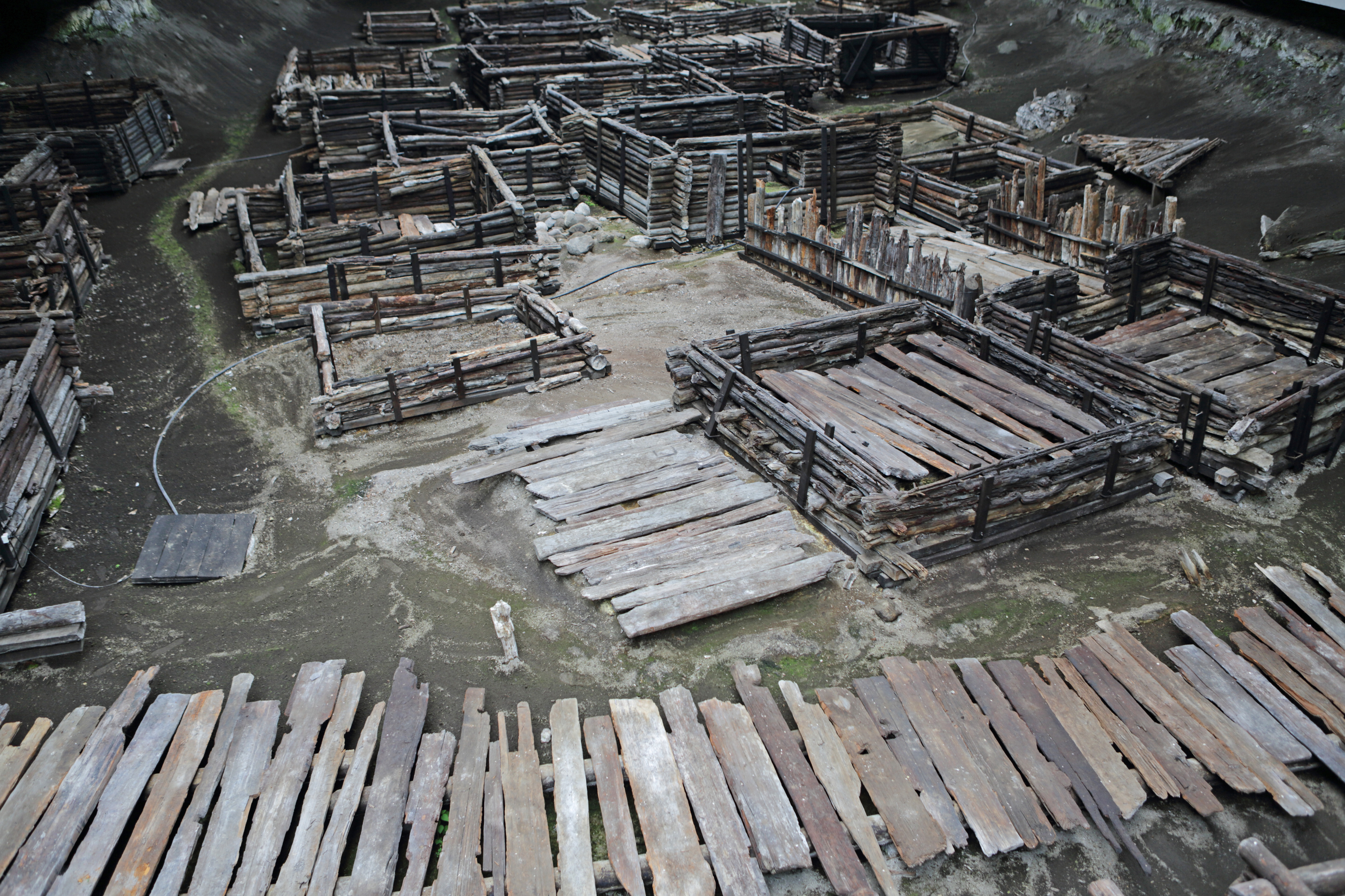 Detail vykopávek středověké vesnice